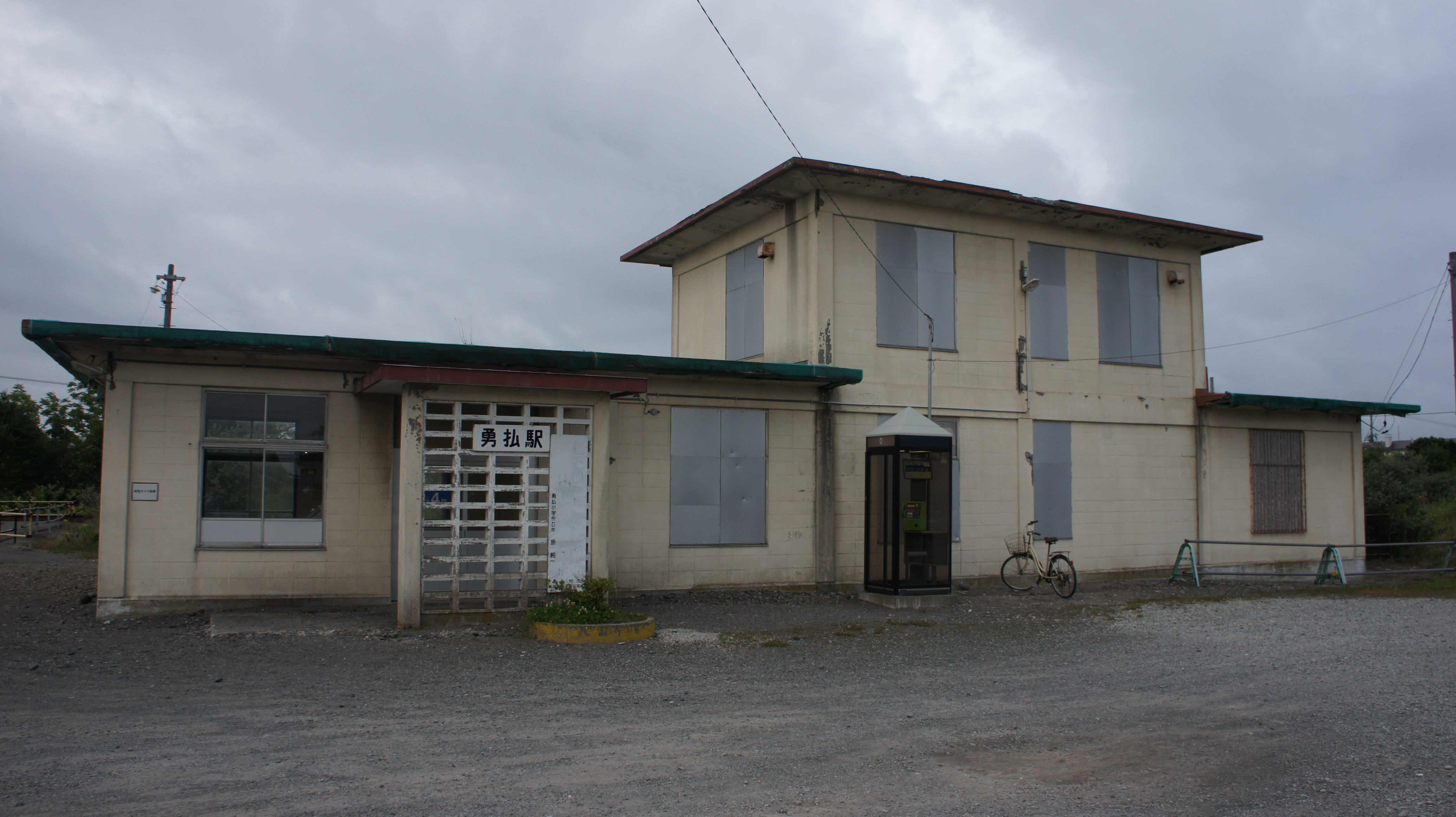 JR日高本線・勇払駅の駅舎